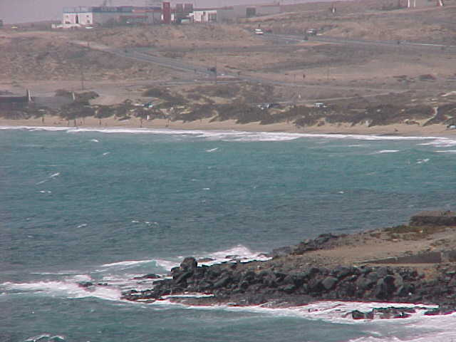 Playa Blanca, en Puerto del Rosario